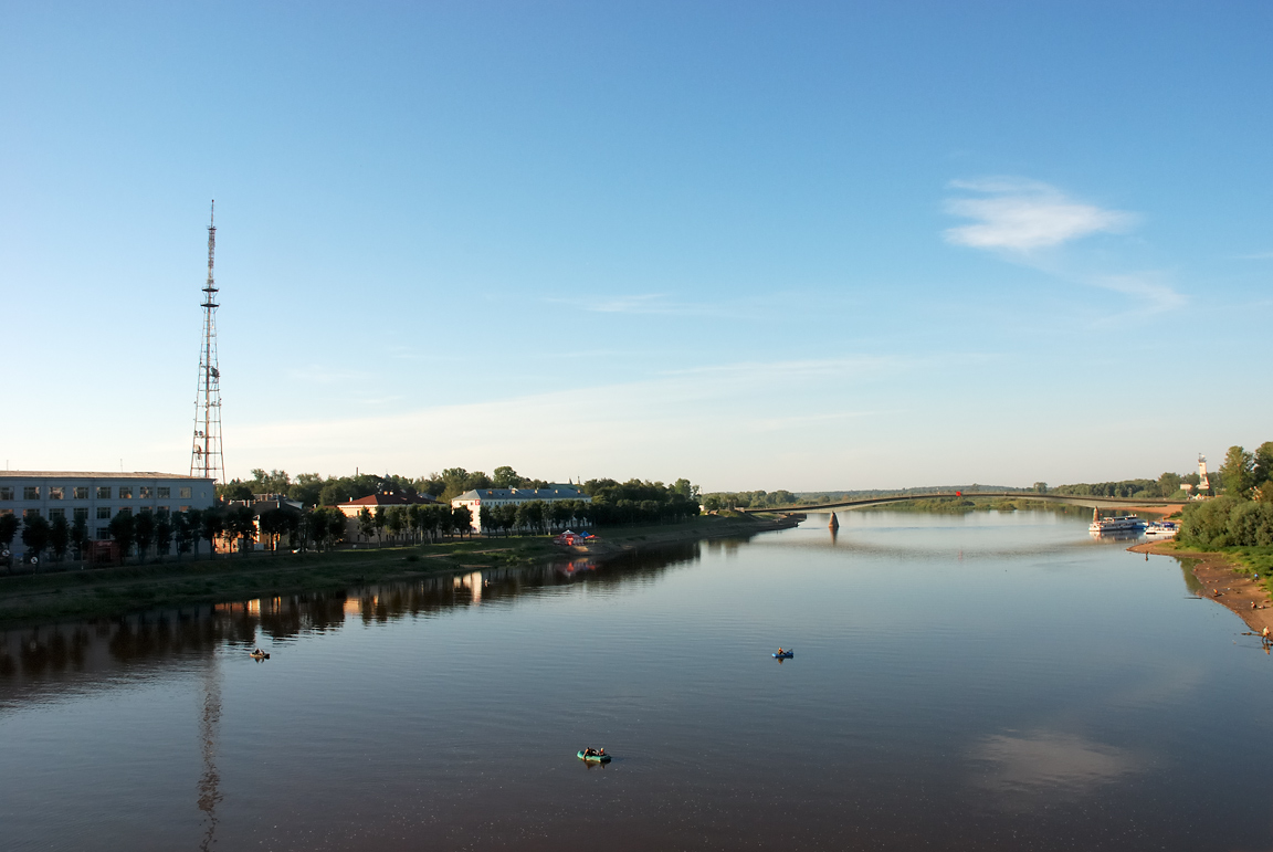 река Волхов и Пешеходный мост в Великом Новгород